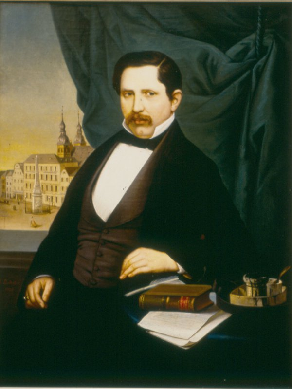 Leopold Kaufmann, Öl auf Leinwand